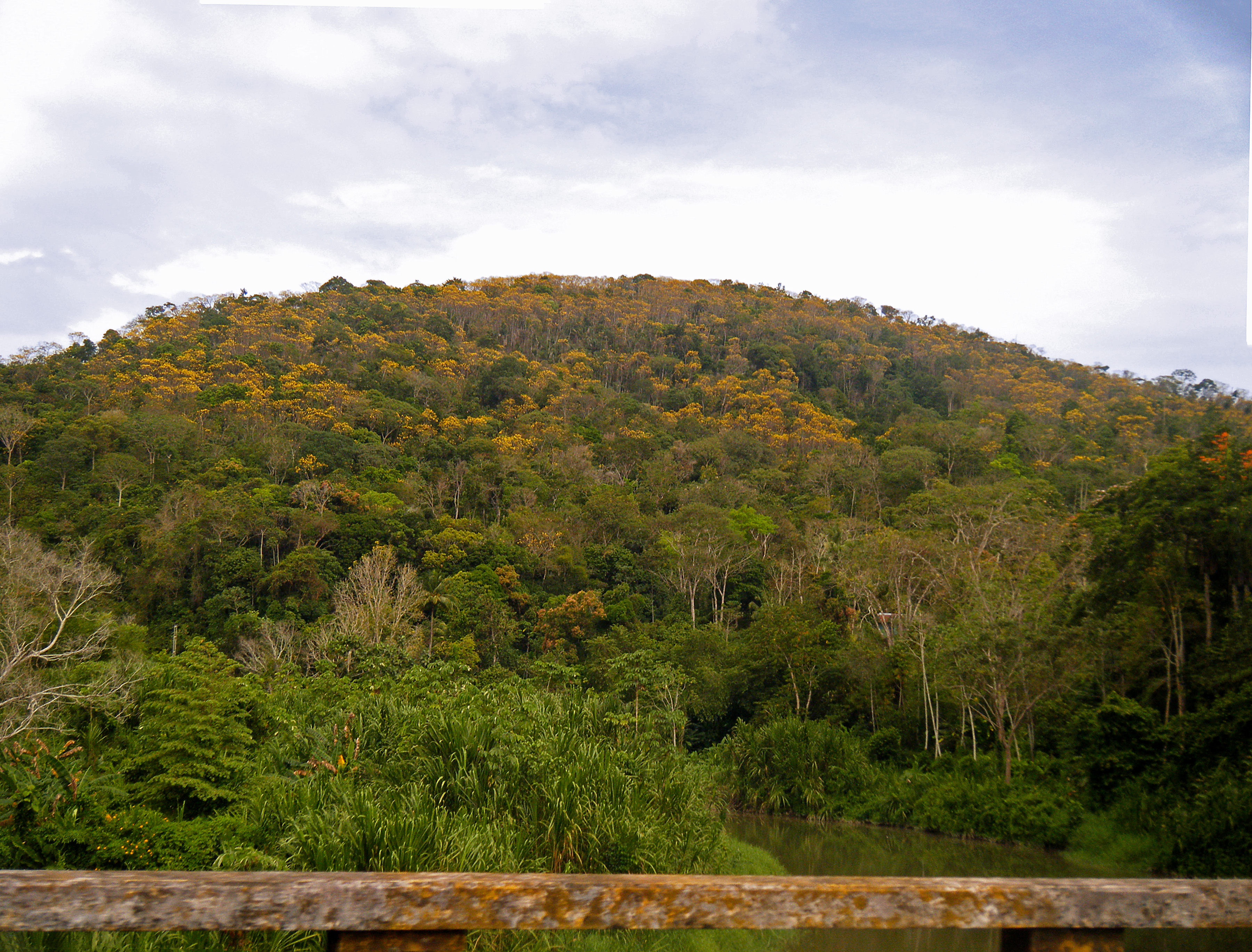 Paisaje sobre el Río Caripito, en la misma localidad del Estado Monagas, Venezuela.